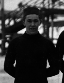 Pokalmatch på Östermalms IP i Stockholm den 24. og 25. februar 1912. Einar Berntsen.